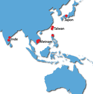 Implantation des Foyers de Charité en Asie (Inde, Philippines, Taïwan, Vietnam)